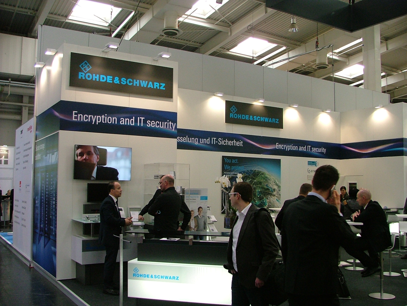 CeBIT 2015 in Hannover